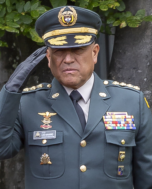 General Luis Fernando Navarro, Comandante General de las Fuerzas Militares de Colombia